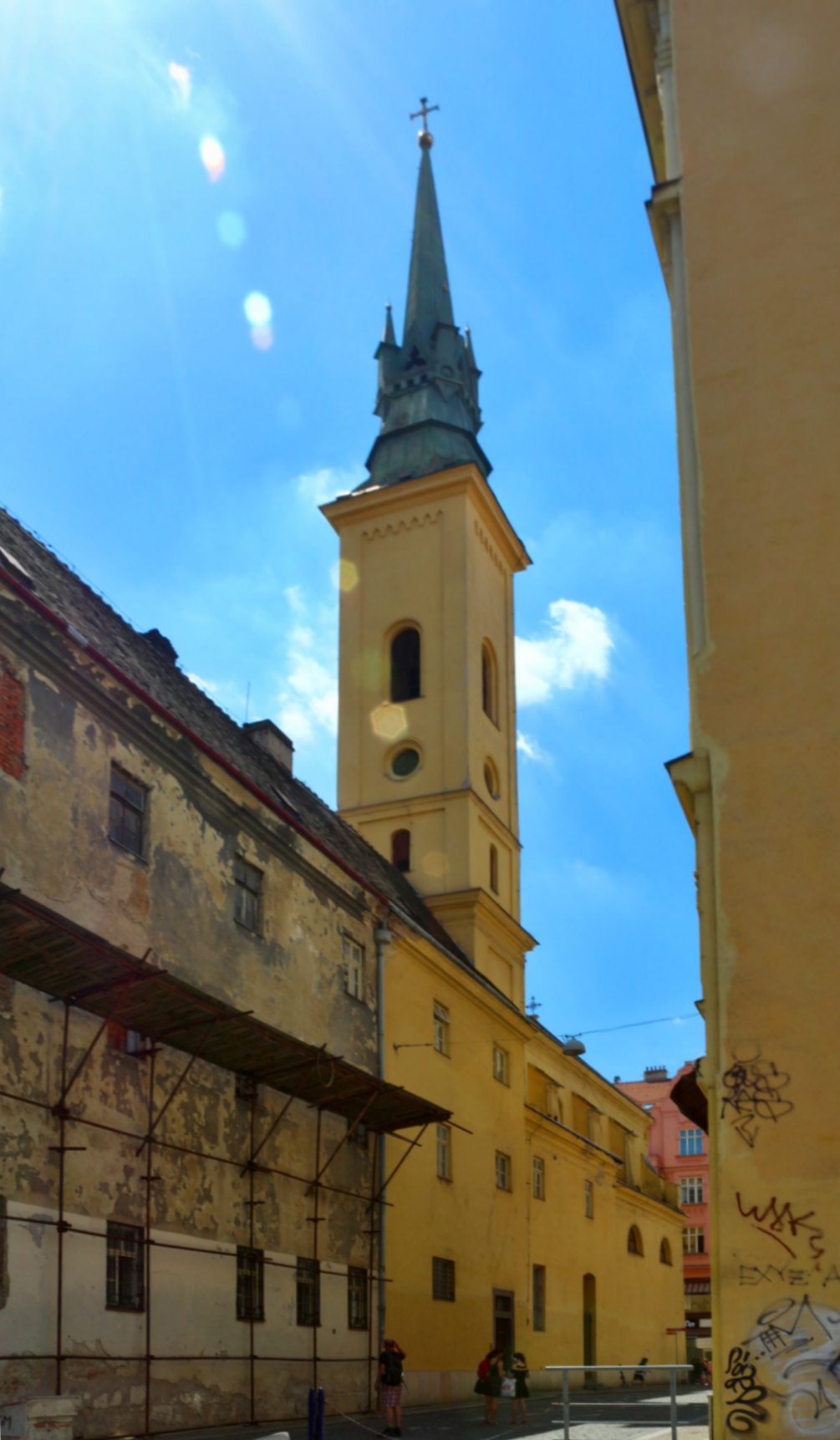 Kostel sv. Máří Magdaleny v Brně